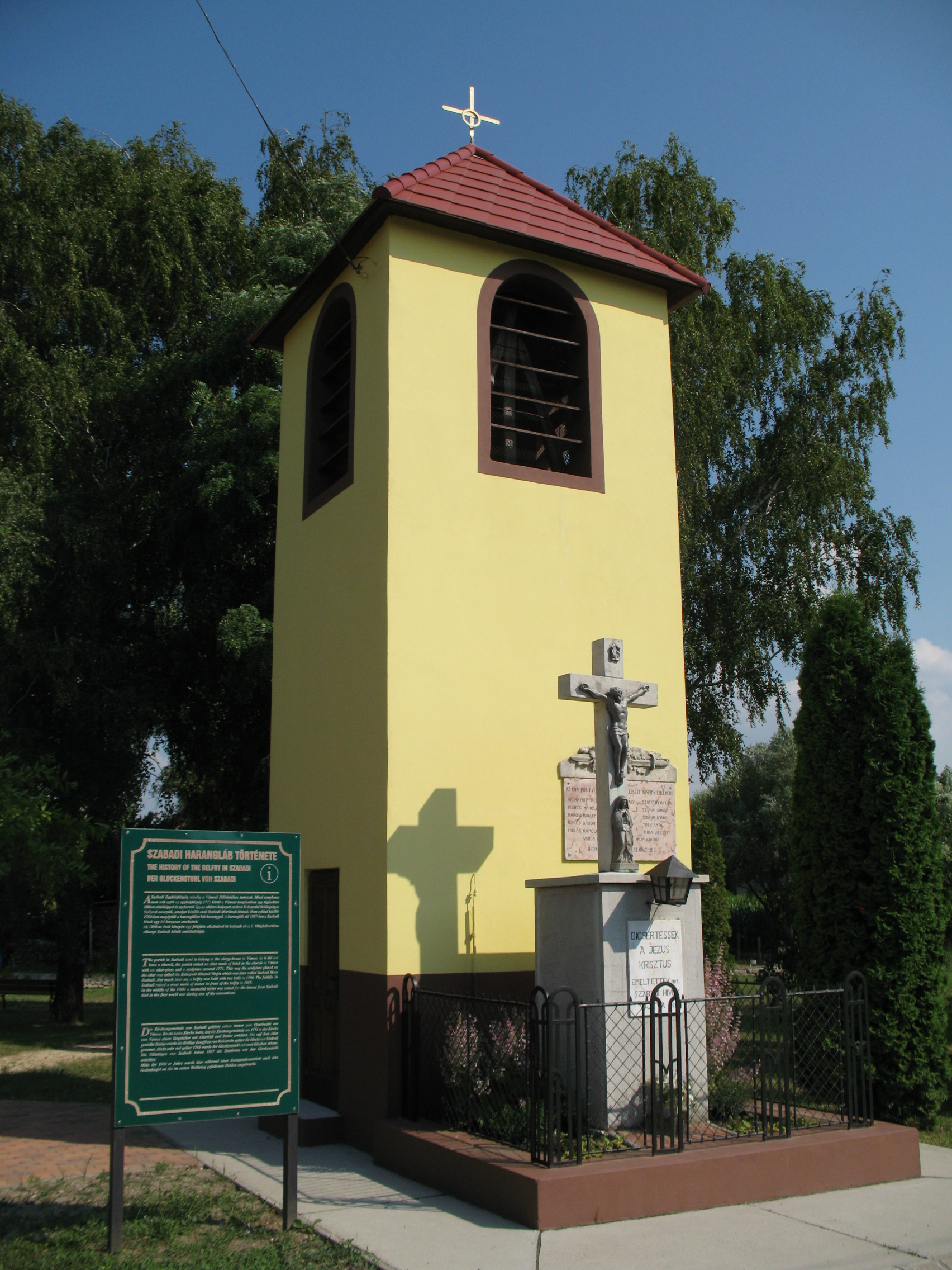 Vámosszabadi